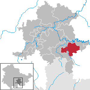 Leutenberg in Thuringia - District Saalfeld-Rudolstadt